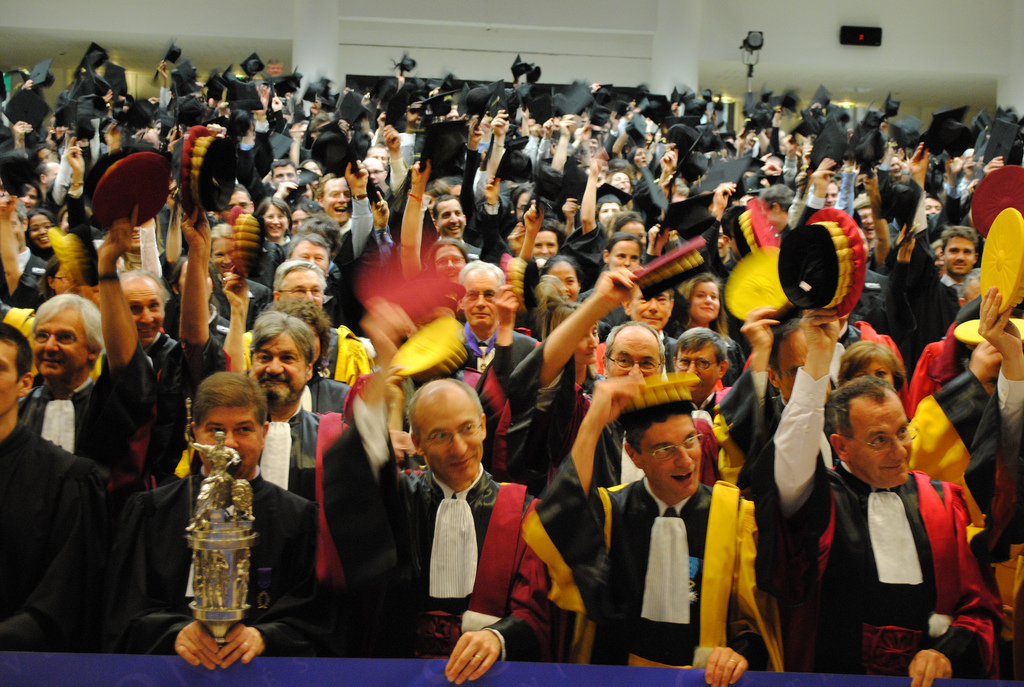 Remise des diplômes de docteurs de Sorbonne universités le 14 mai 2011. Les professeurs avaient revêtu la toge, aux couleurs des disciplines enseignées à l'université : écarlate pour le droit, jonquille pour les lettres et sciences humaines, amarante pour les sciences.